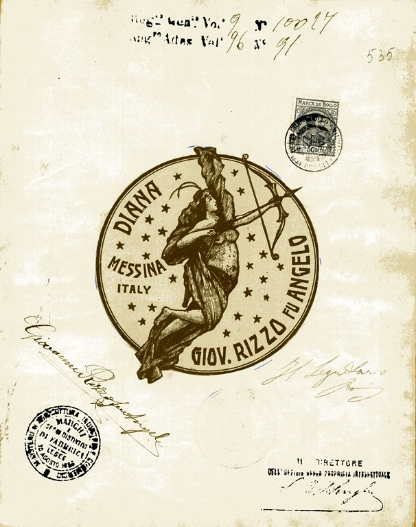 Marchio di fabbrica Diana della ditta Giovanni Rizzo fu Angelo di Messina raffigurante un cielo stellato, chiuso da un cerchio, in cui si libra la figura di una donna rappresentata come la dea della caccia in atto di lanciare una freccia (AS Catania, Prefettura di Catania, I, el. 42, b. 33/508 , fasc. 4, c. 535r., 1909)